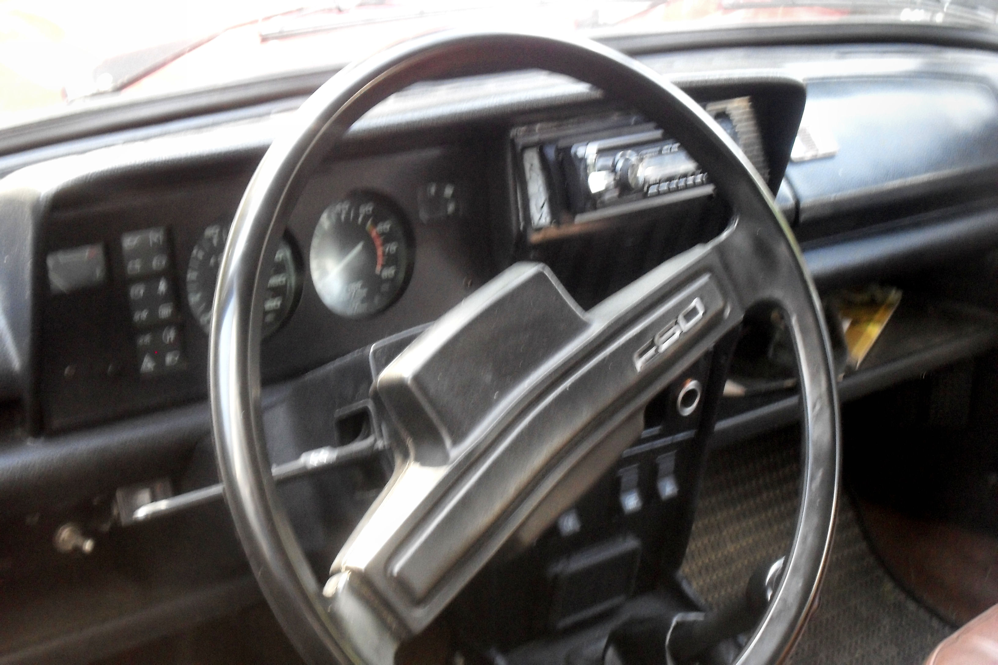 Deska rozdzielcza FSO 125p 1.5 ME z 1990 roku. Wyposażona już w okrągłe zegary.